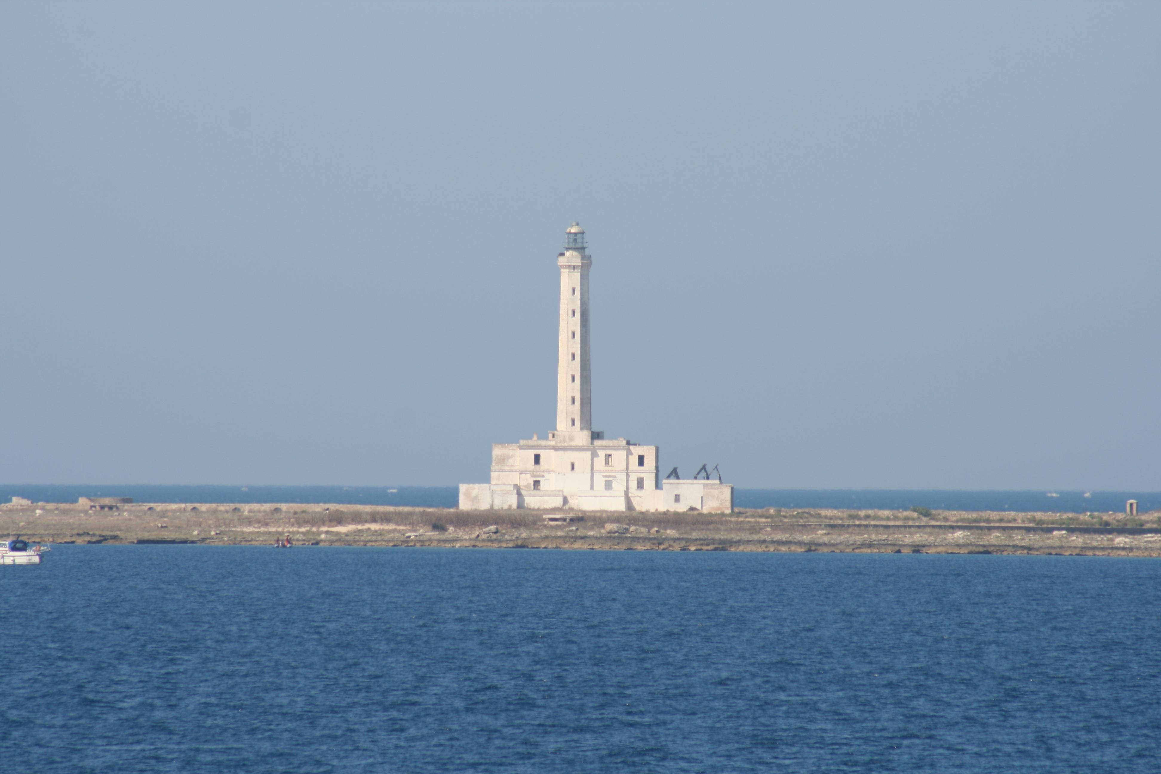 Gallipoli: Faro sull'Isola di Sant'Andrea